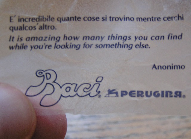 «È incredibile quante cose si trovino mentre cerchi qualcos'altro» (It is amazing how many things you can find while you're looking for something else). Citazione di anonimo sulla carta di un cioccolatino, tenuta fra due dita.